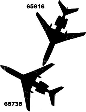 Схема столкновения двух Ту-134 в 1979 году над Днепродзержинском